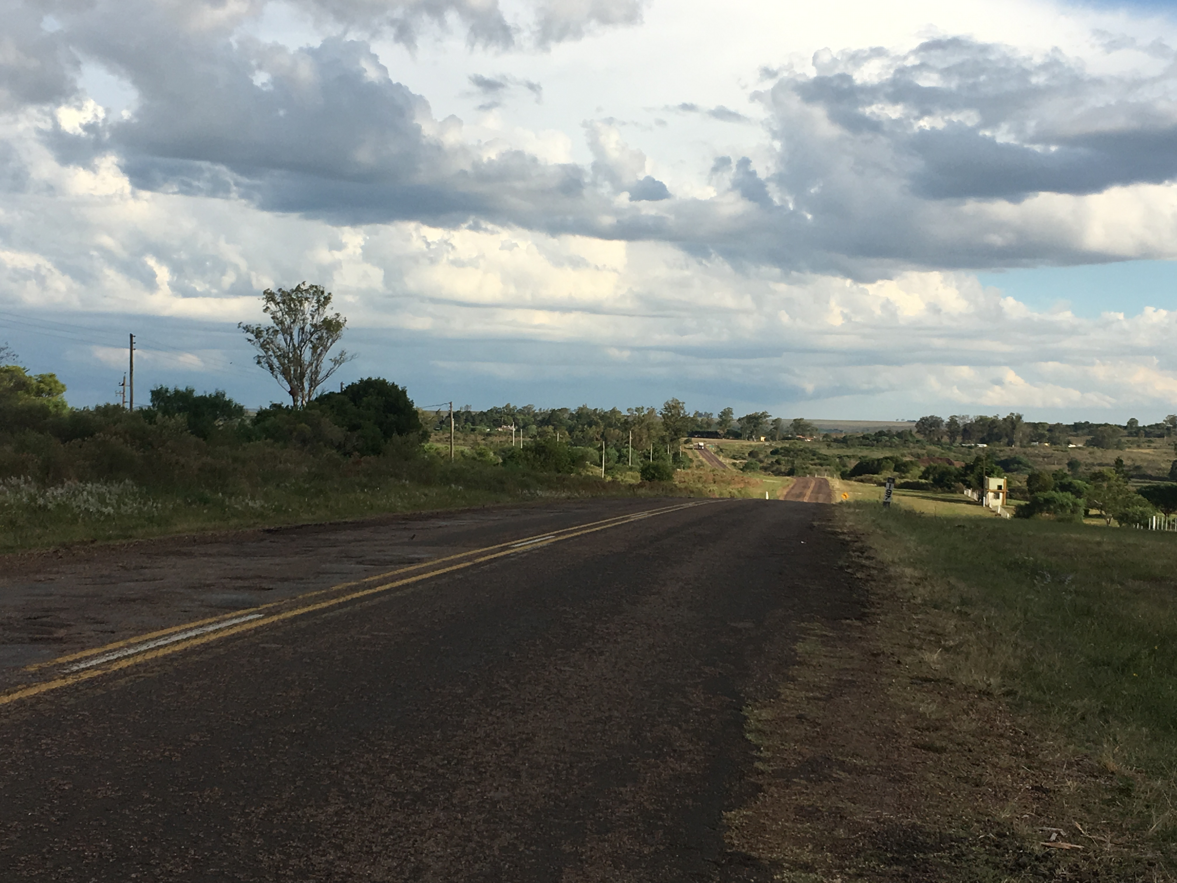 Ruta 4